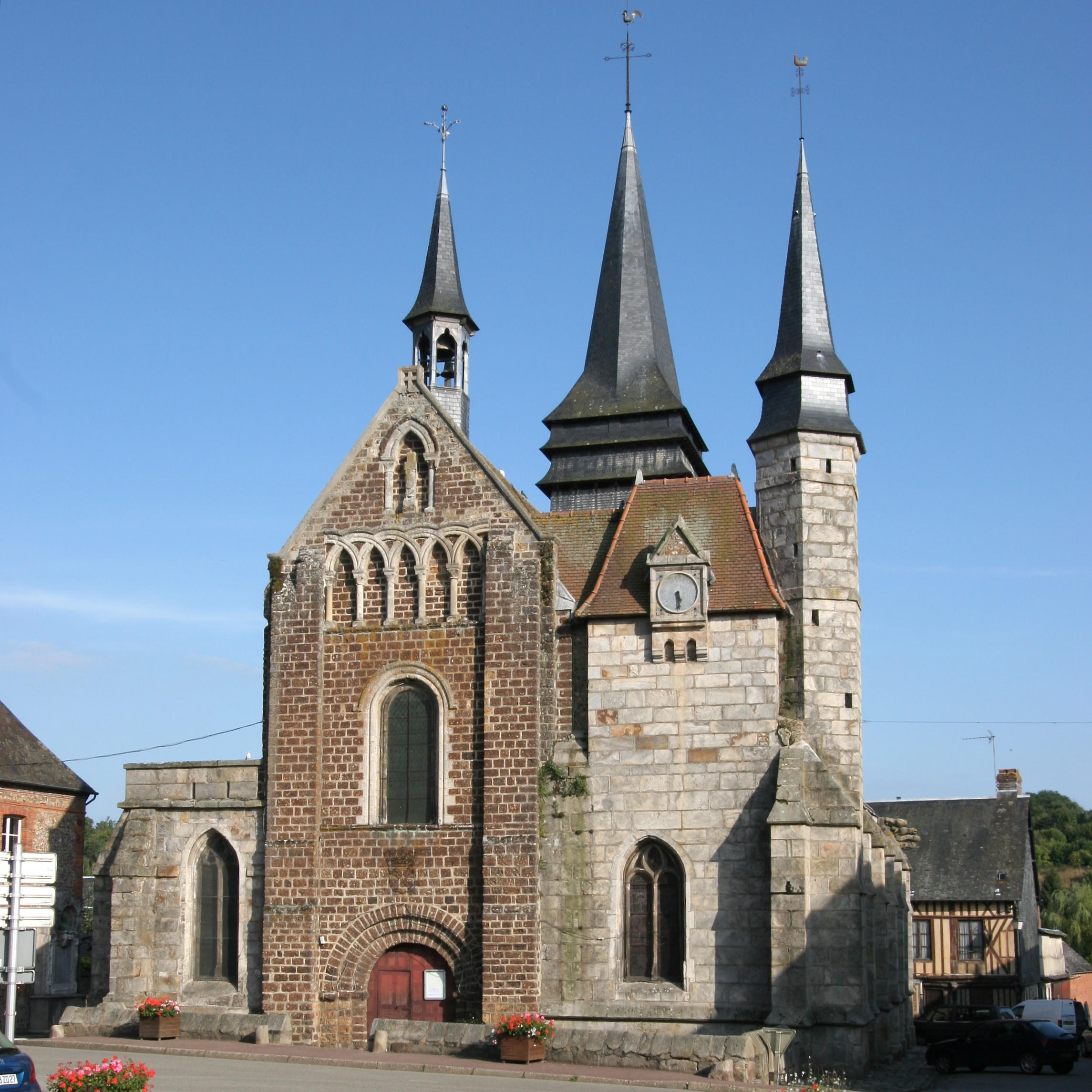 Église de Broglie, Eure, France